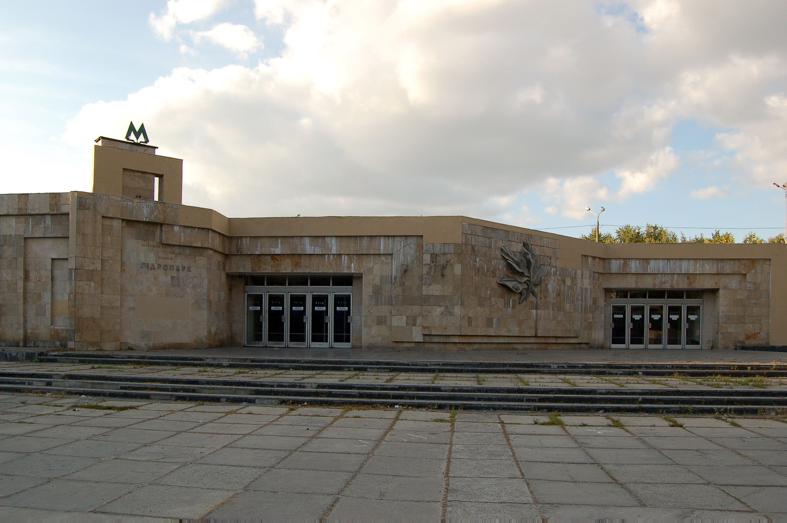 Станция метро «Гидропарк», юго-западный вестибюль